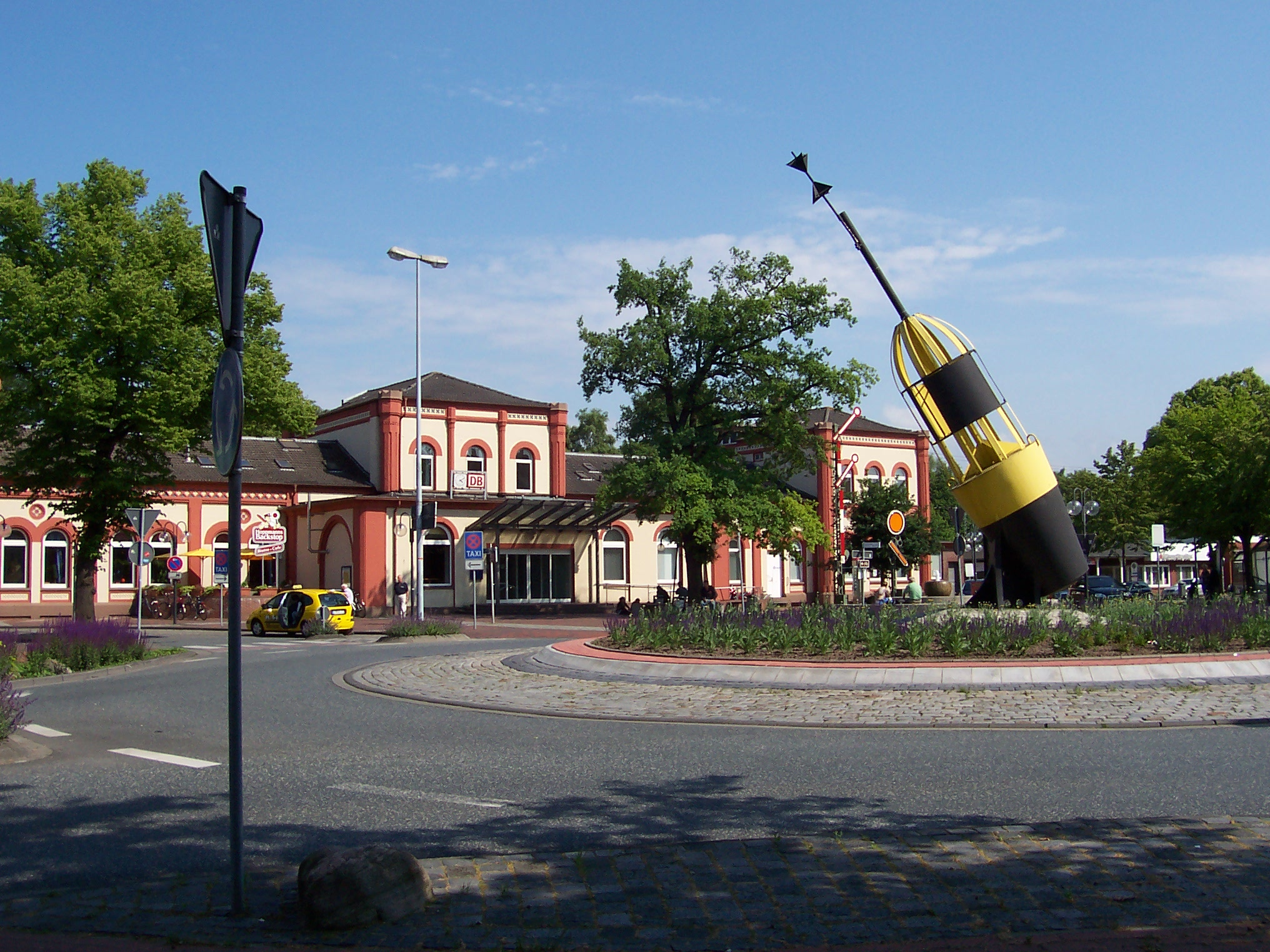 Leer (Ostfriesland), Bahnhof